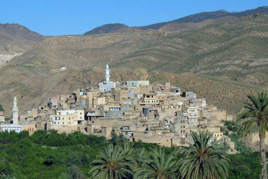 Village de Menâa